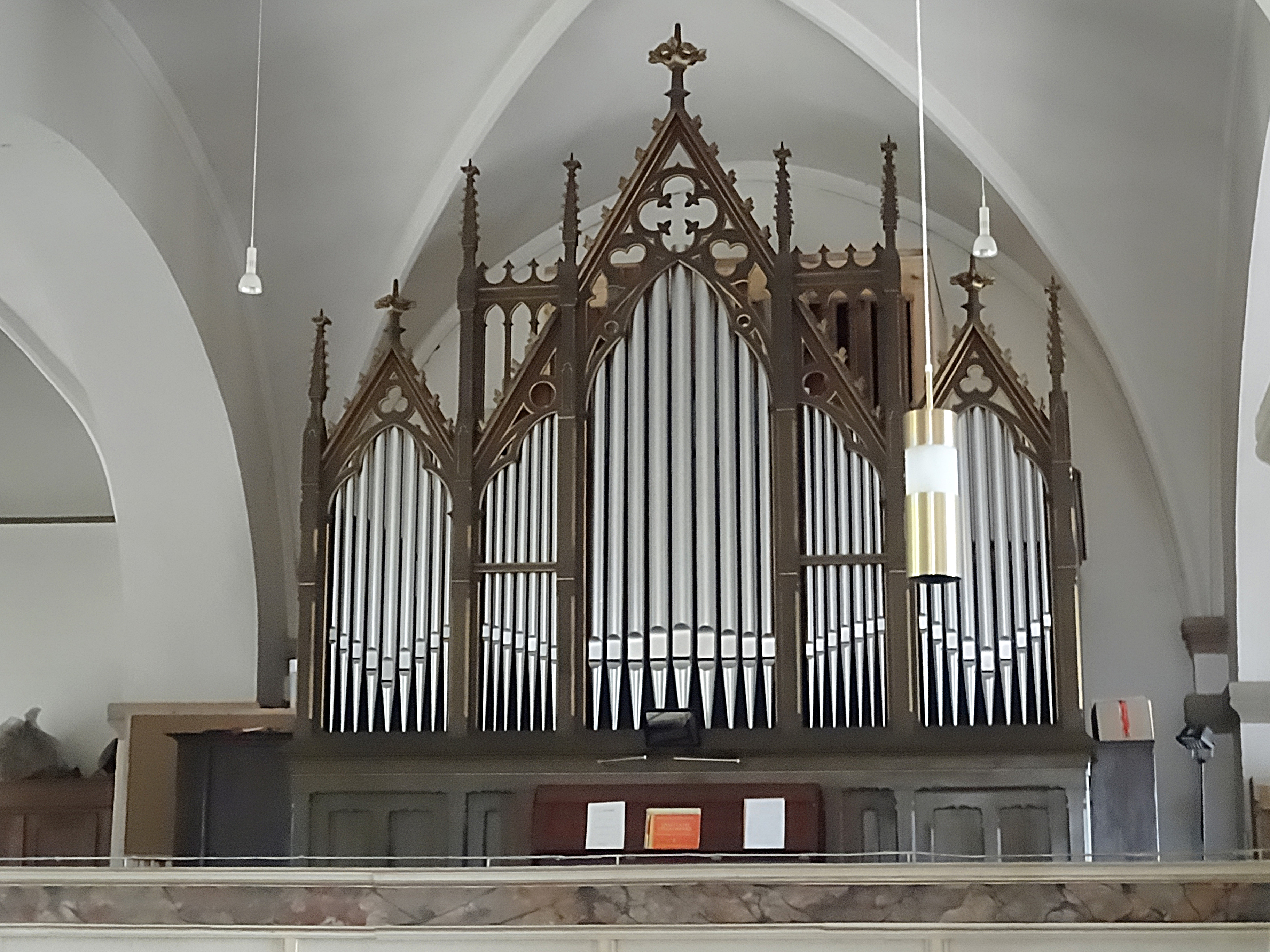 Truthmann-Orgel (2010) im Gehäuse von Wilhelm Boden (1839)[1]